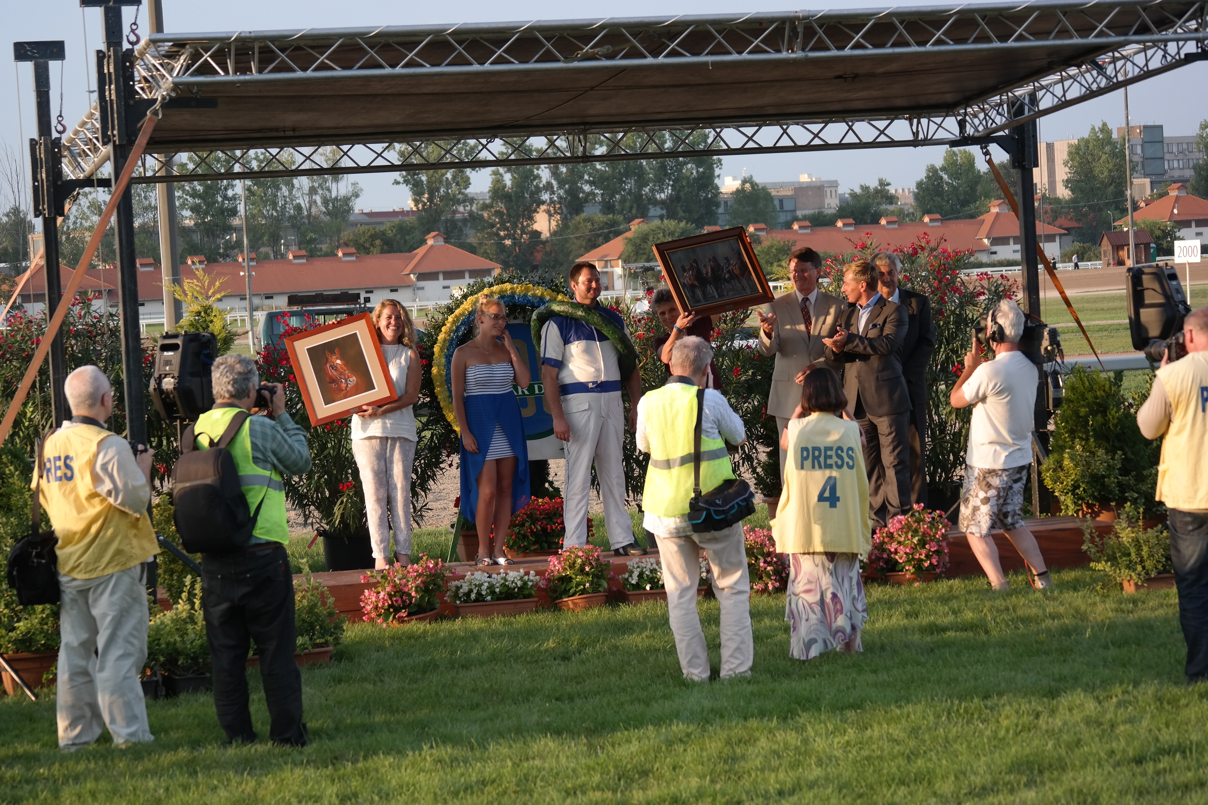 100. Magyar Ügetőderby eredményhirdetése. Balról-jobbra: a tulajdonos, Bacsa Mihály képviseletében Balogh Erika és Gáspár Fanni; Juhász Balázs idomárhajtó; valamint a tenyésztők: Dr. Török Lászlóné és Dr. Török László. Kincsem Park.